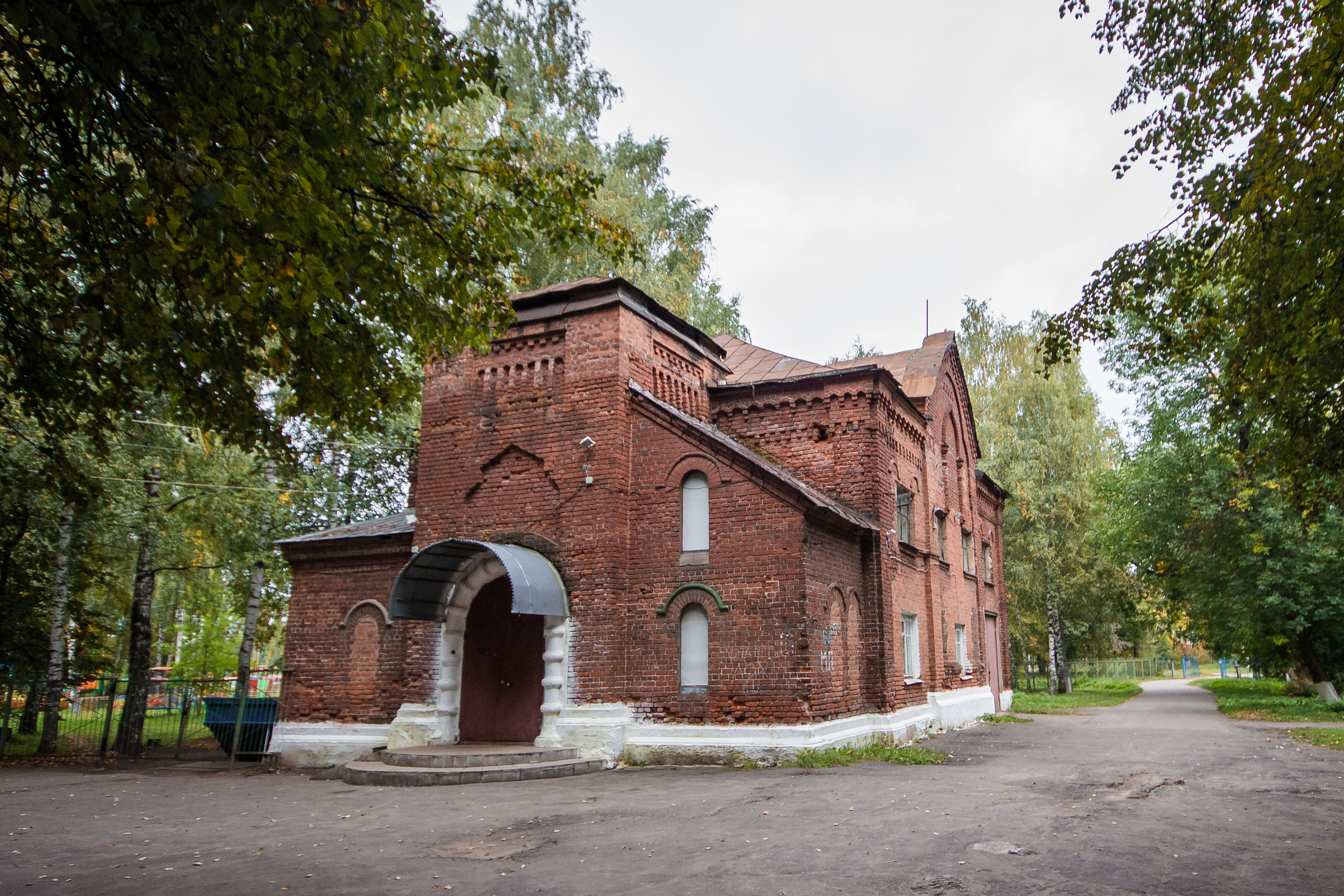 Церковь Старообдческая: Городской парк, Шуя, Ивановская область